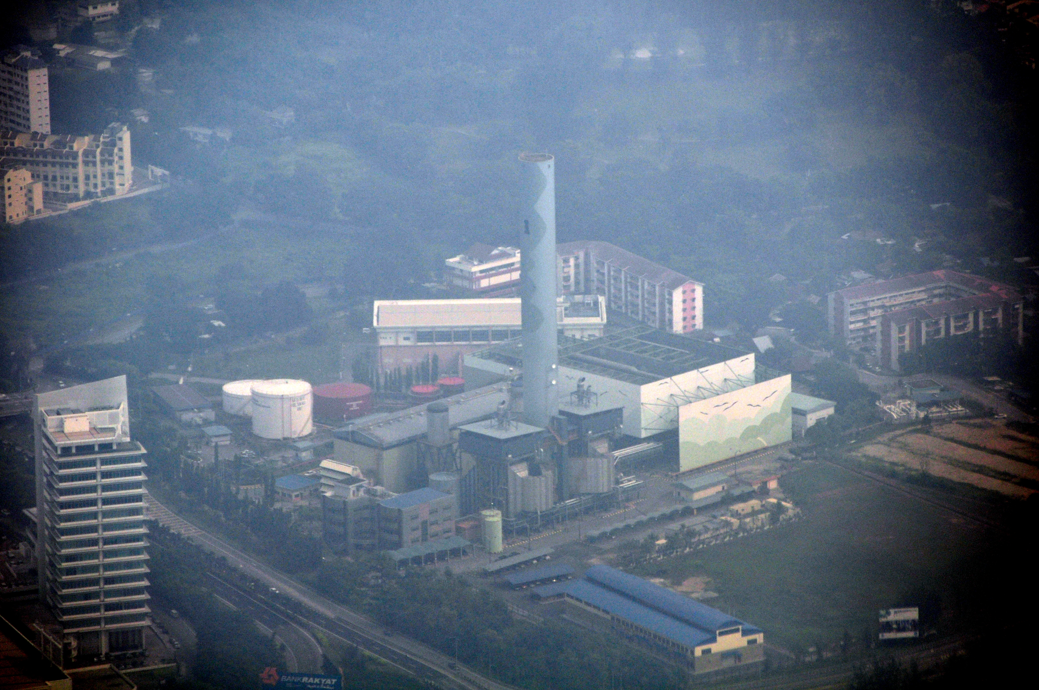 Tenaga Energy Plant at Gelugor